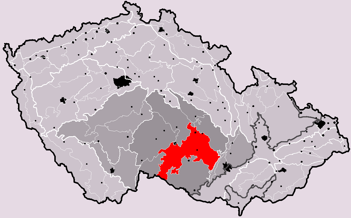 Poloha geomorfologického celku Křižanovská vrchovina v rámci České republiky. Hercynský systém Hercynská pohoří I Česká vysočina I2 (II) Česko-moravská subprovincie I2C (IIC) Českomoravská vrchovina I2C-5 (IIC-5) Křižanovská vrchovina